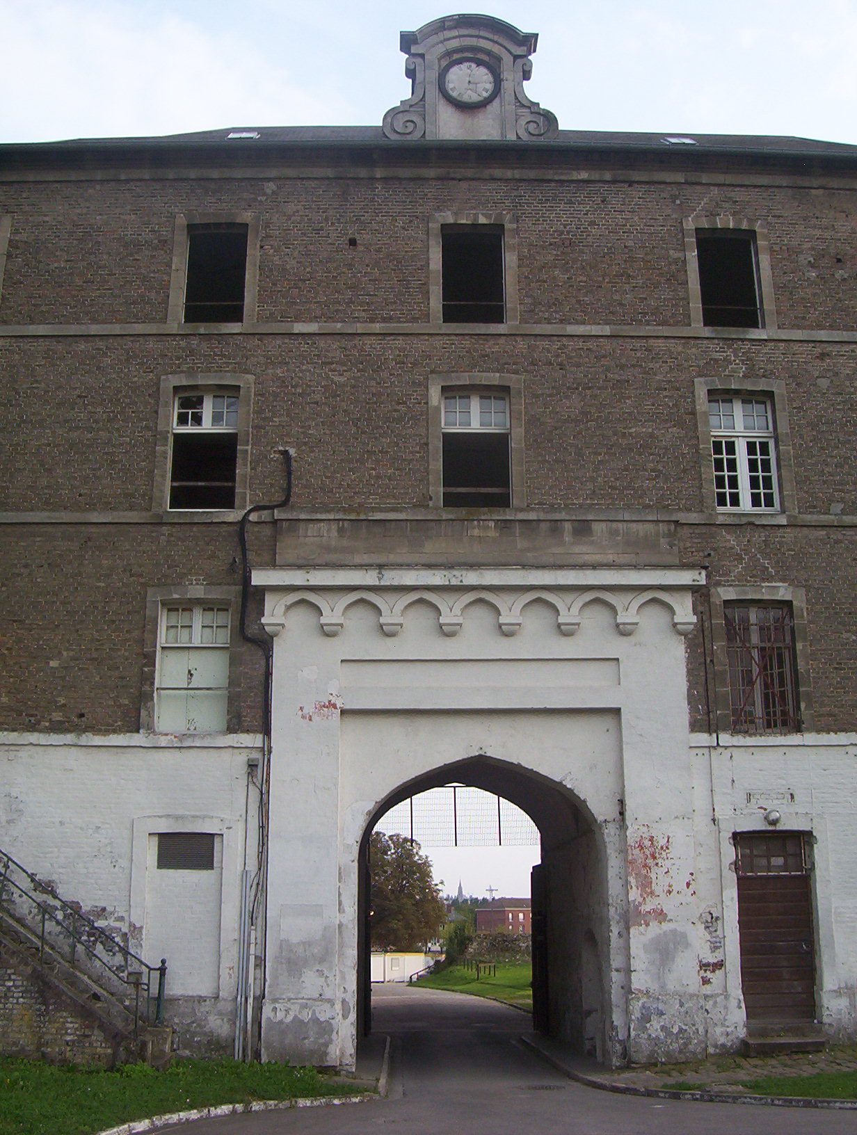 Citadelle d'Amiens. This building is en partie classé, en partie inscrit au titre des Monuments Historiques. .